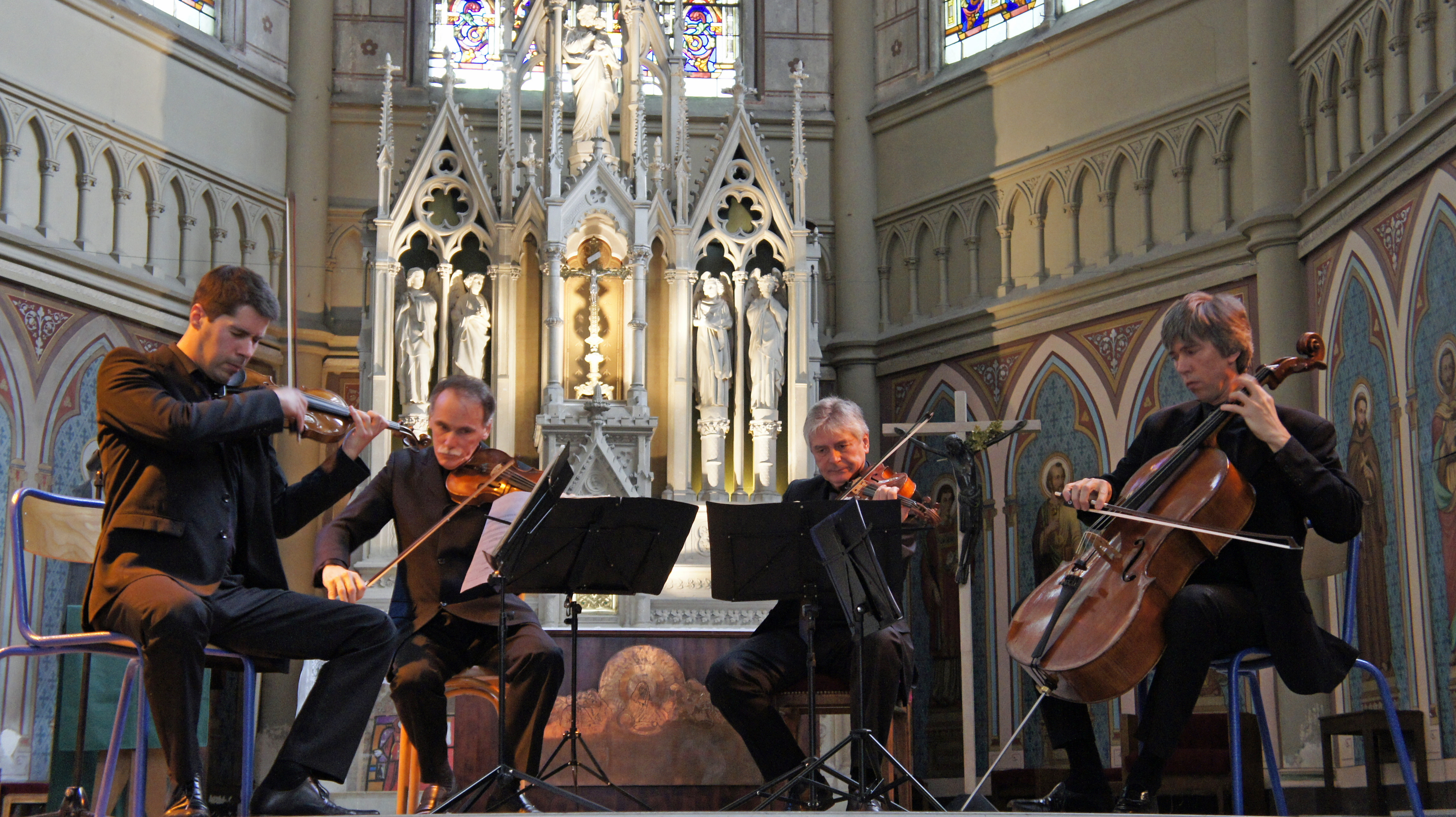 Le Quatuor Parisii lors des Flaneries musicales 2012.